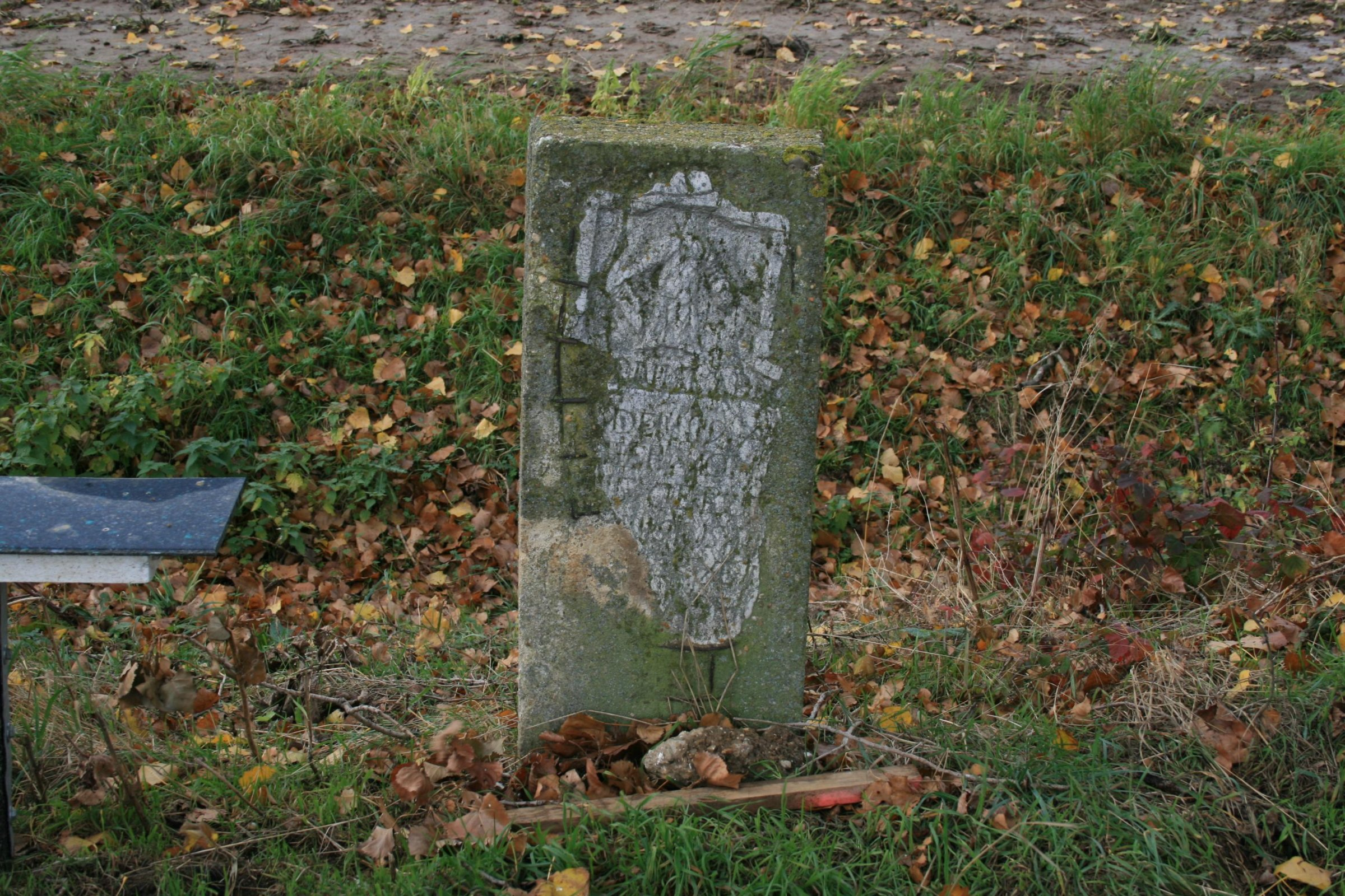 Das Kreuz am Ellebach südwestlich von Nörvenich-Rommelsheim